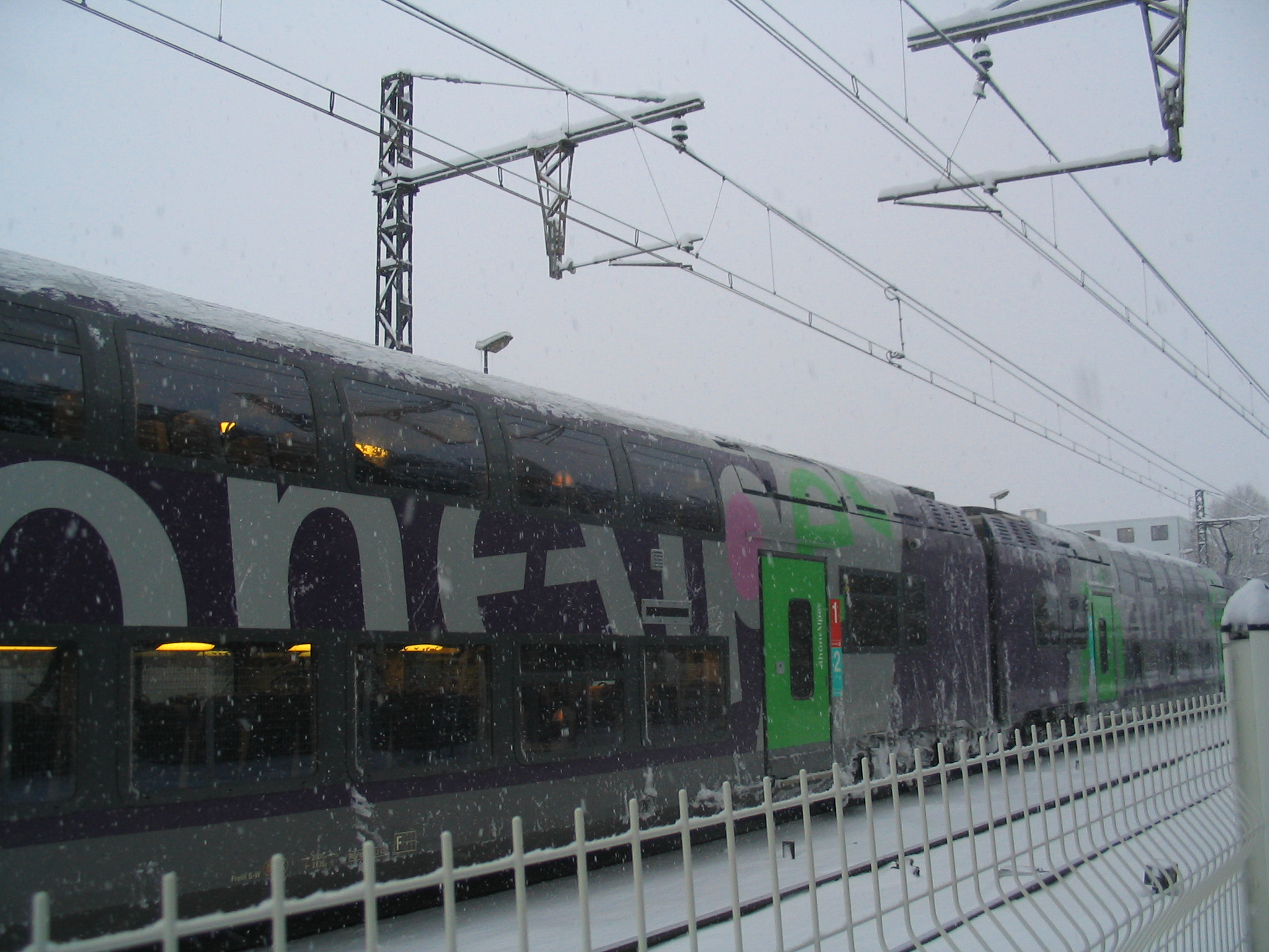 Train en gare de Saint-Maurice-de-Beynost, le 2 décembre 2010.